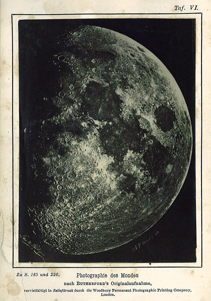 Copy of glued-in frontispiece from Die chemischen Wirkungen des Lichts und die Photographie: in ihrer Anwendung in Kunst, Wissenschaft und Industrie by Hermann Wilhelm Vogel, 1873.